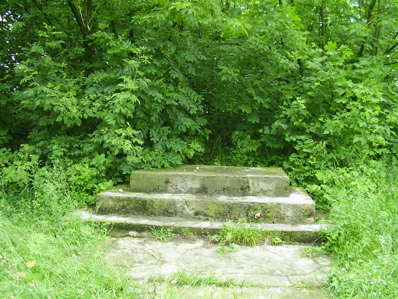 Цімкавічы. Месца касцёла